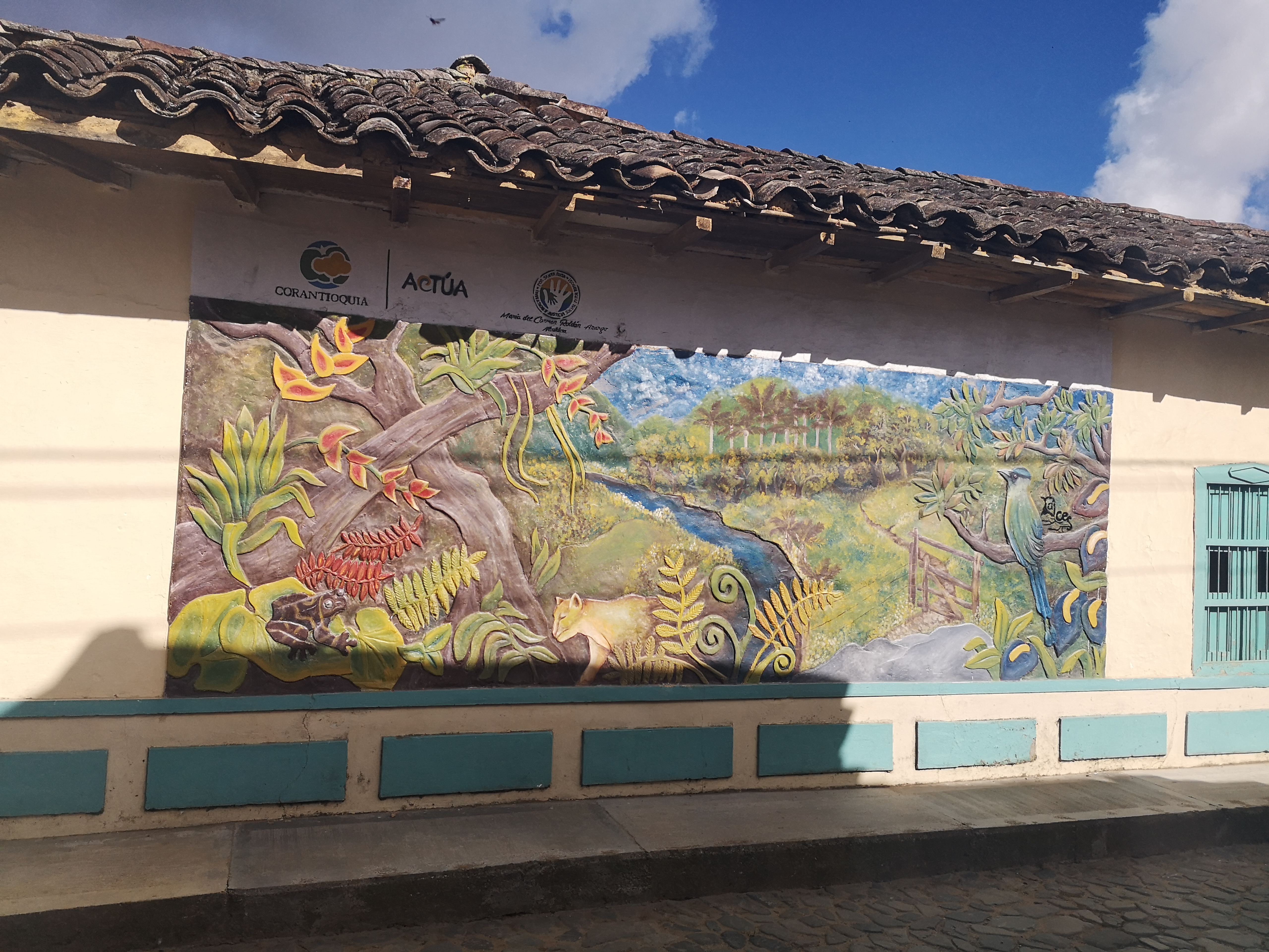 Mural en Hoyorrico, Santa Rosa de Osos